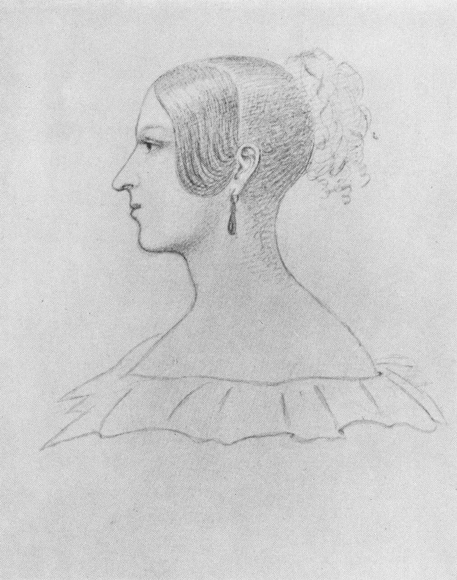 Therese Staufenau geb. Gauß, Zeichnung von Benedikt Listing, 1830-1855.